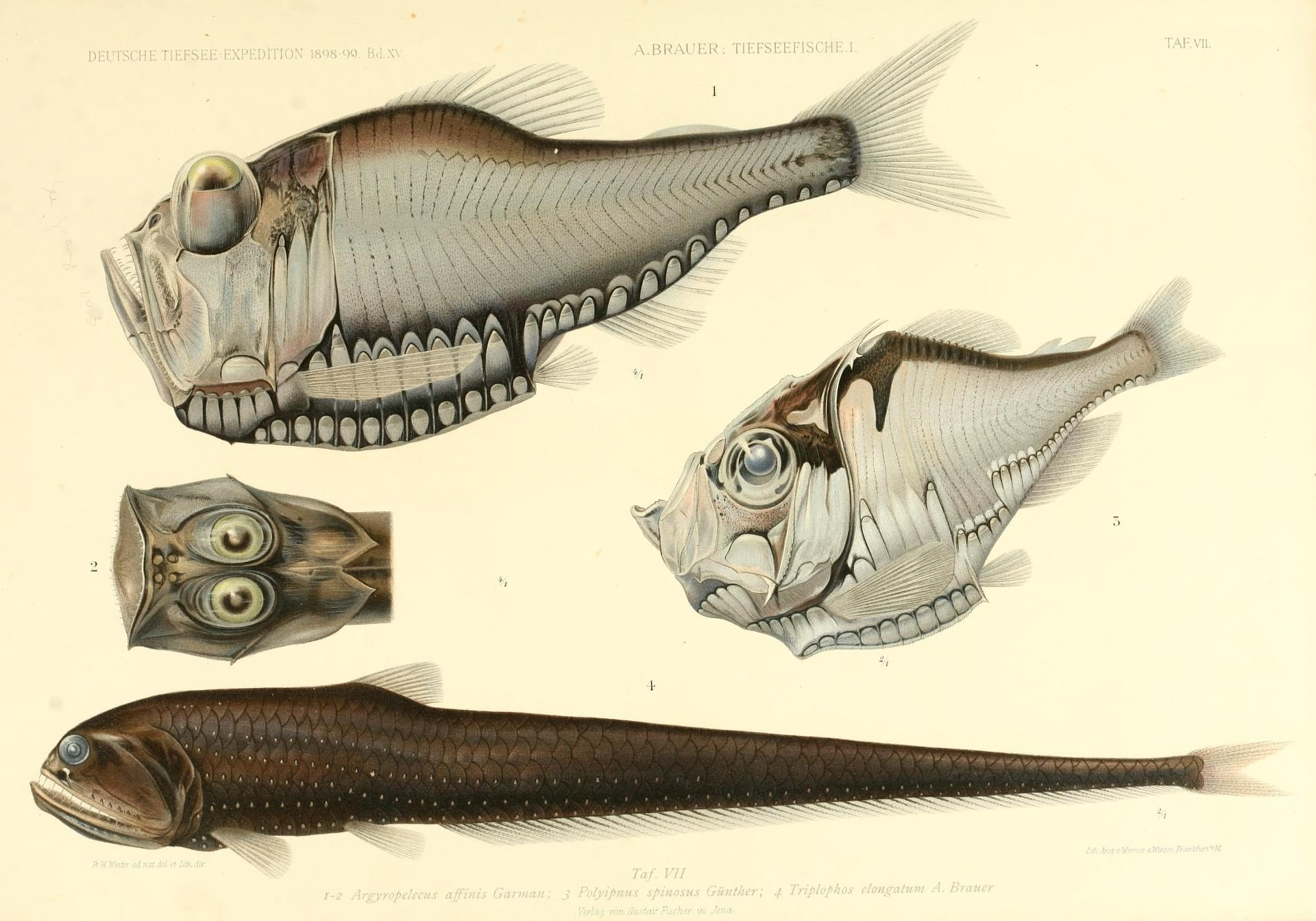 1. & 2. Argyropelecus affinis, 3. Polyipnus spinosus, 4. Triplophos elongatum Wissenschaftliche Ergebnisse der Deutschen Tiefsee-Expedition auf dem Dampfer "Valdivia" 1898-1899. Im Auftrage des Reichsamtes des Innern hrsg. von Carl Chun [et al.]